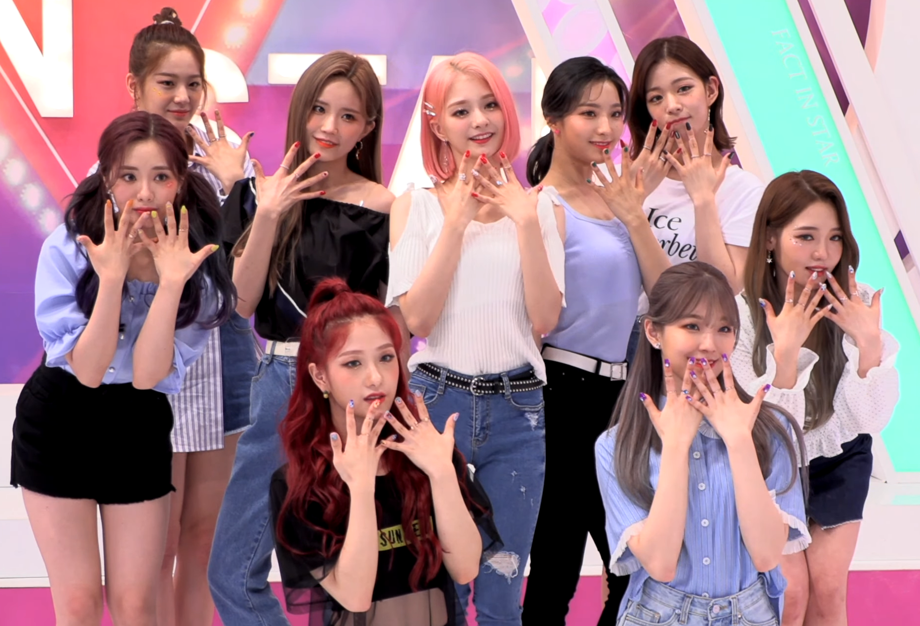 190611 프로미스나인(fromis 9) tbs 팩트인스타